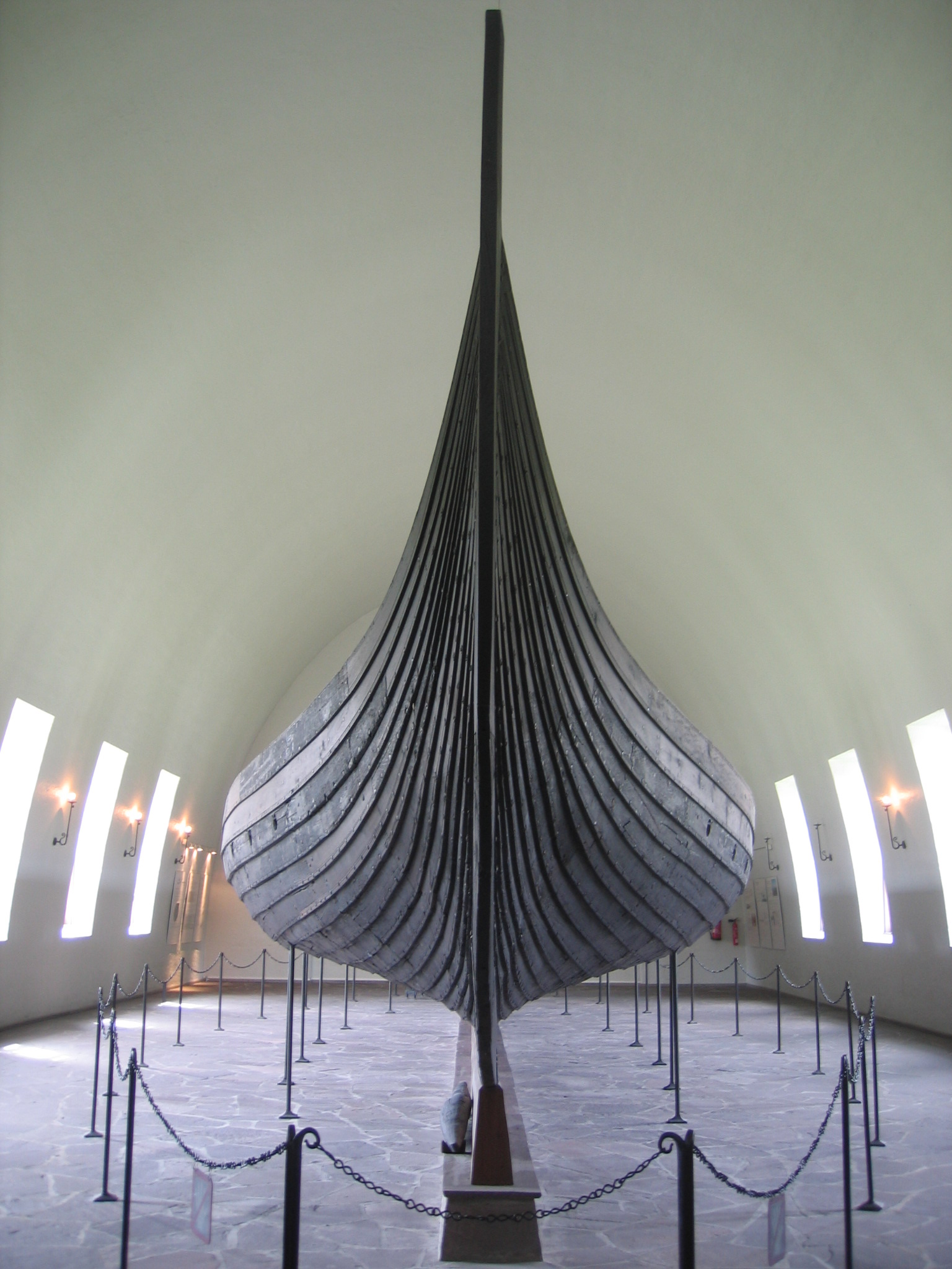 Gokstadskipet, Vikingskipmuseet, Oslo